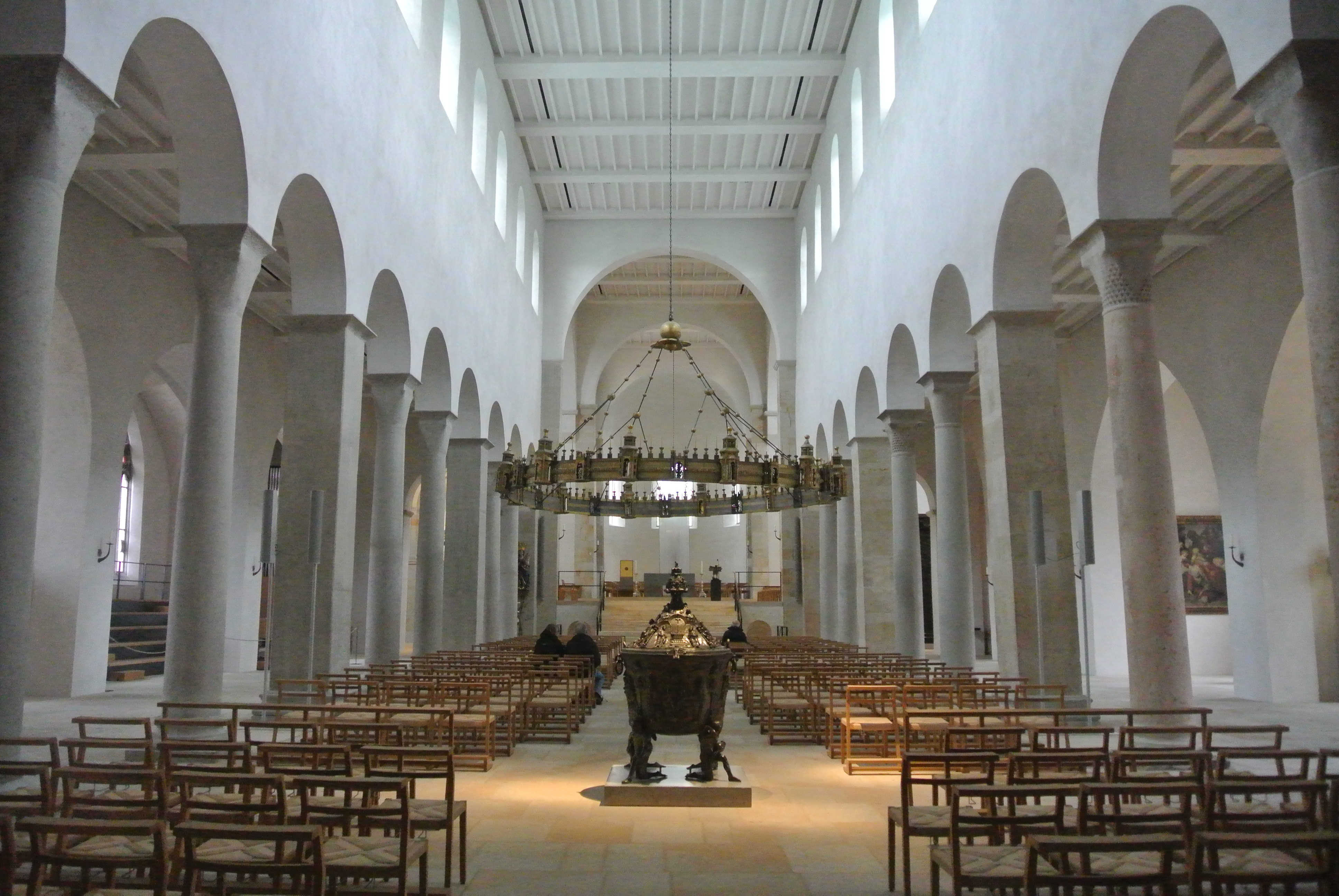 希尔德斯海姆主教座堂内景